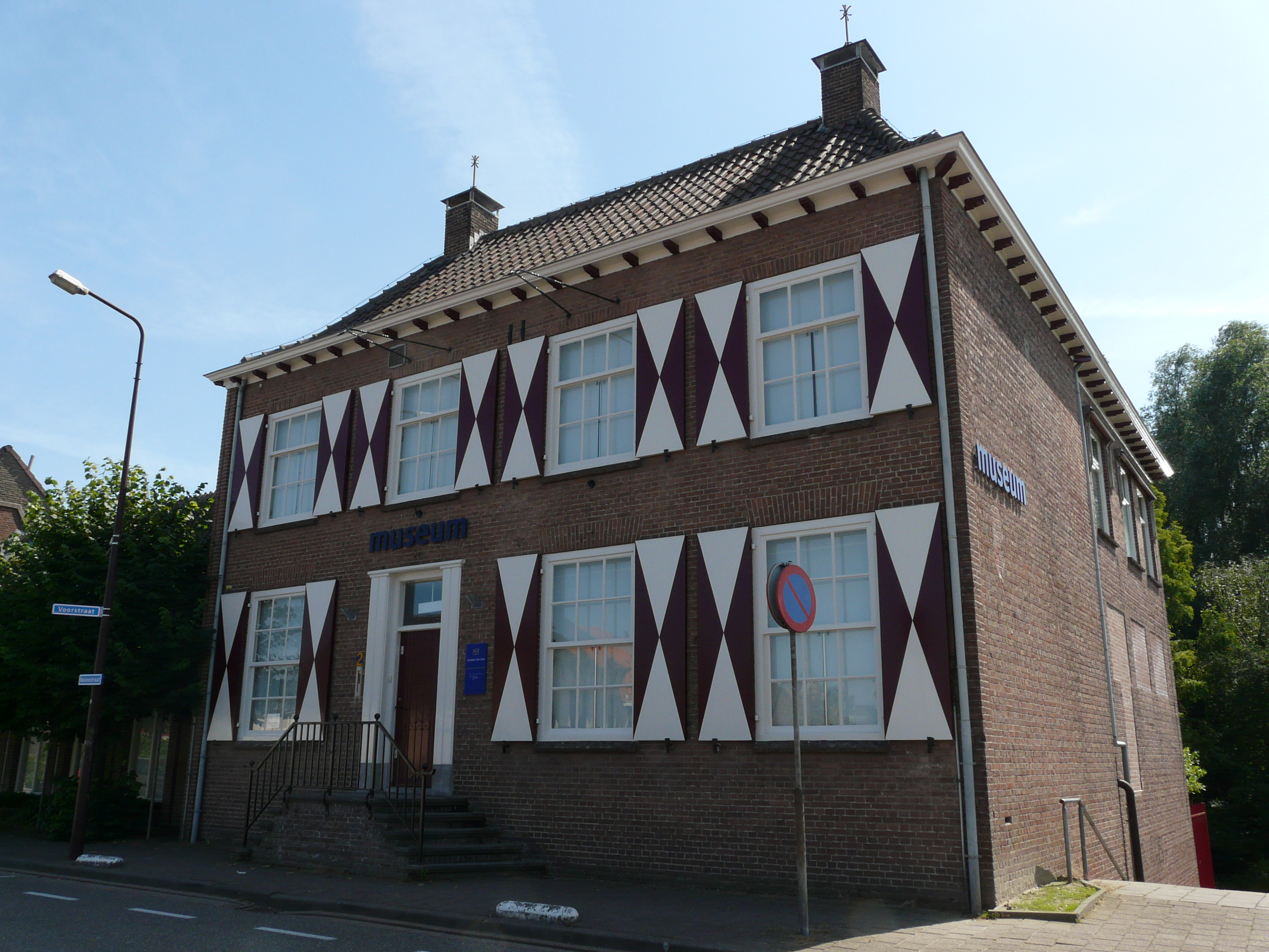 Zicht op een deel van het voormalige Museum en galerie Van Lien in Fijnaart. Tegenwoordig is er in het pand gevestigd MarkVliet Netwerk Notarissen, Kadedijk 2, 4793 GB Fijnaart